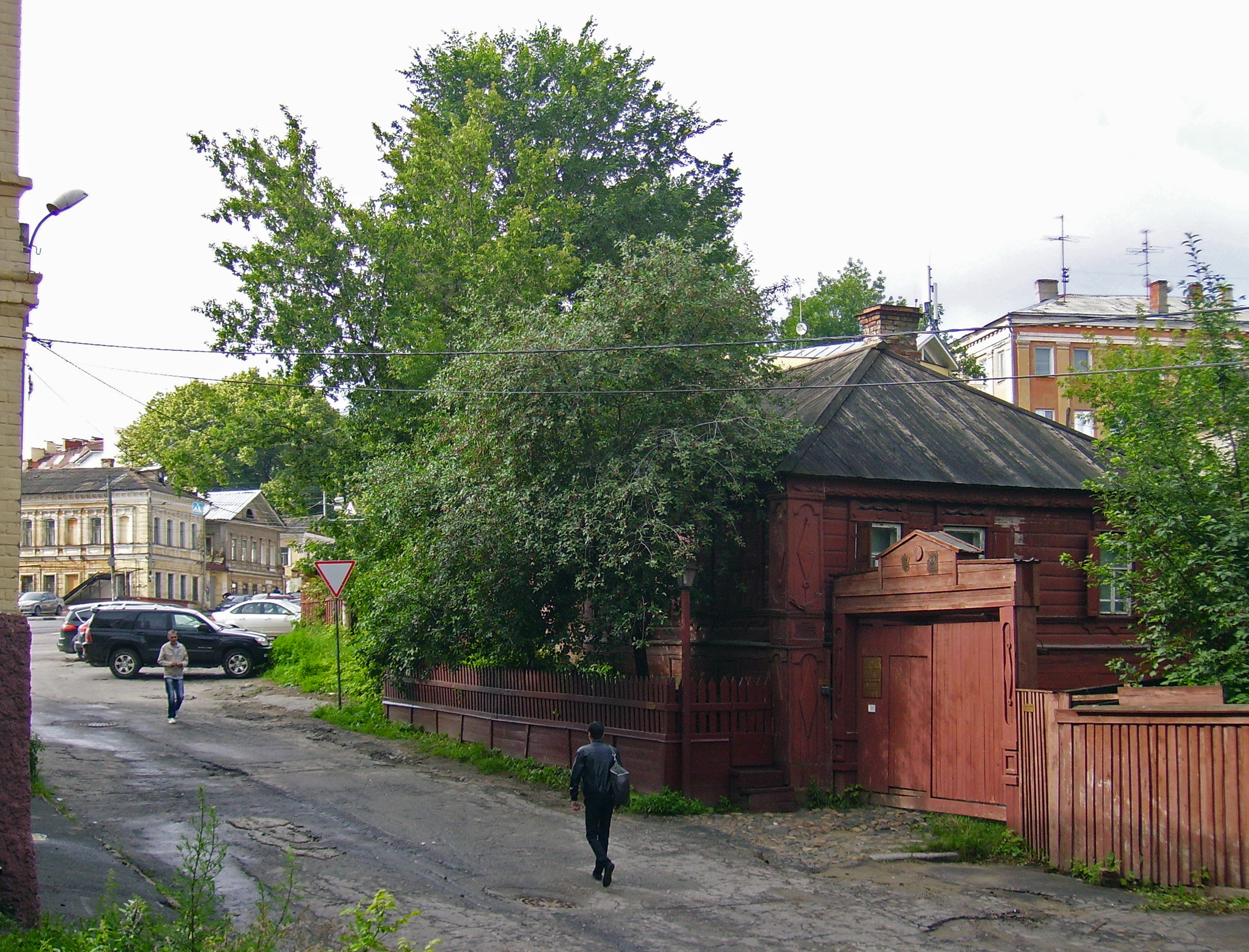 Нижний Новгород. Домик Каширина (Музей детства Максима Горького)